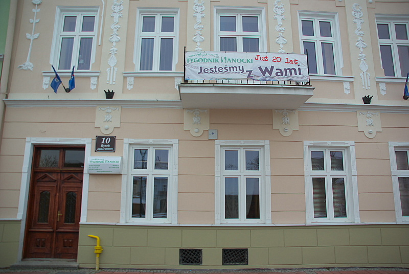 siedziba Tygodnika Sanockiego Rynek 10